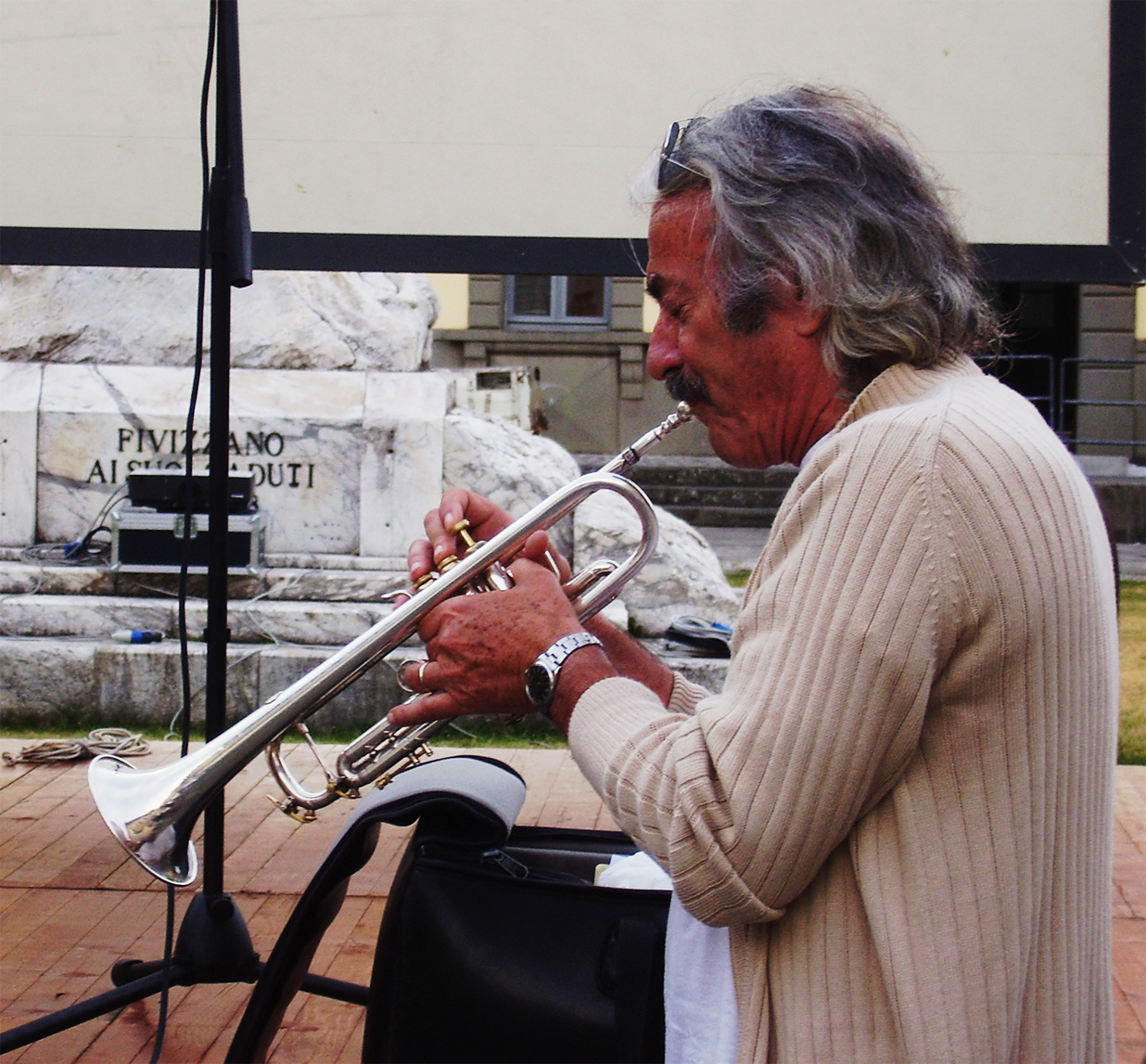 Enrico rava a fivizzano